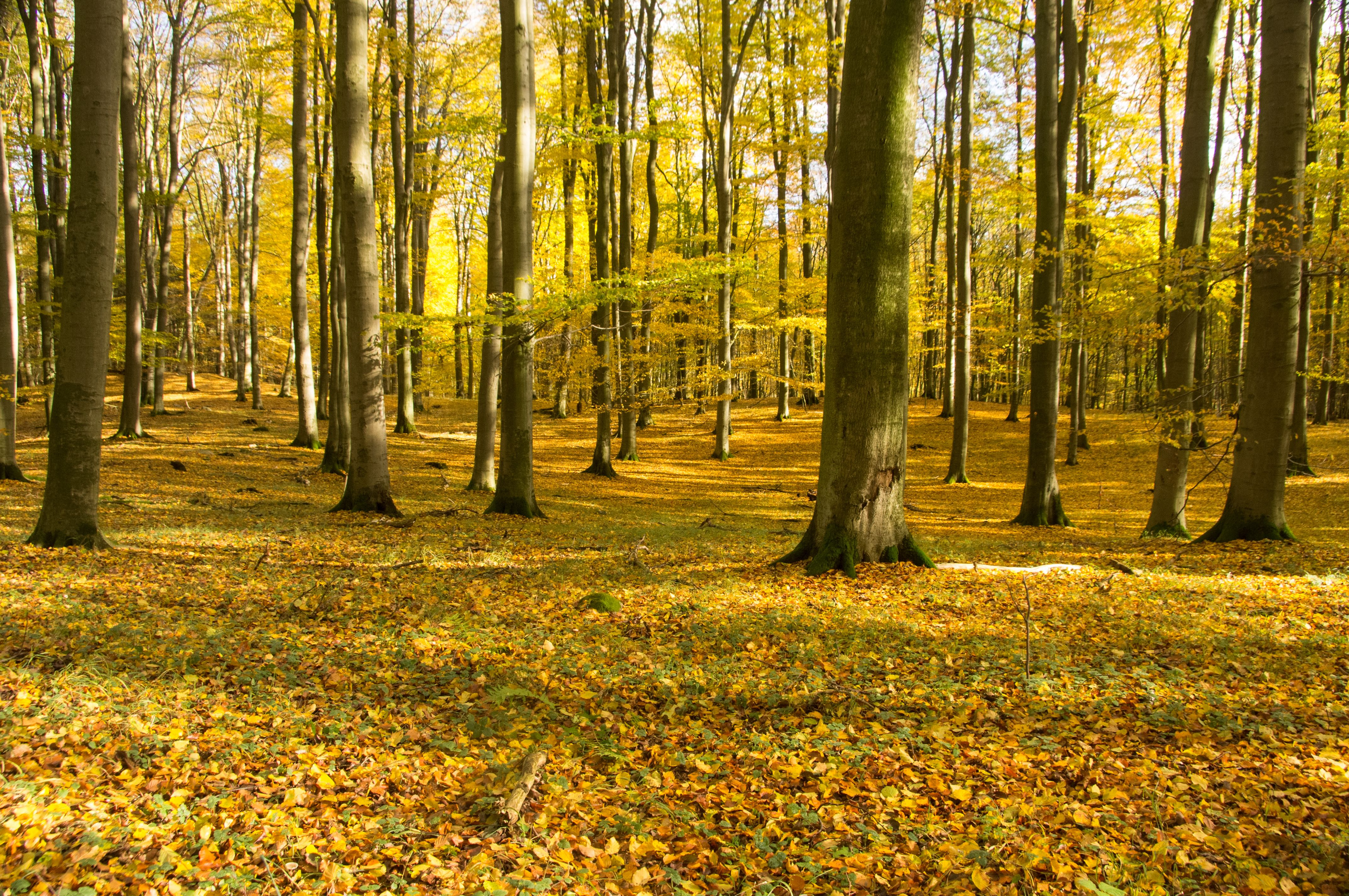 Herbstaspekt des Perlgras-Buchenwald (Melico-Fagetum) im NSG Kiecker, Nordwestuckermark